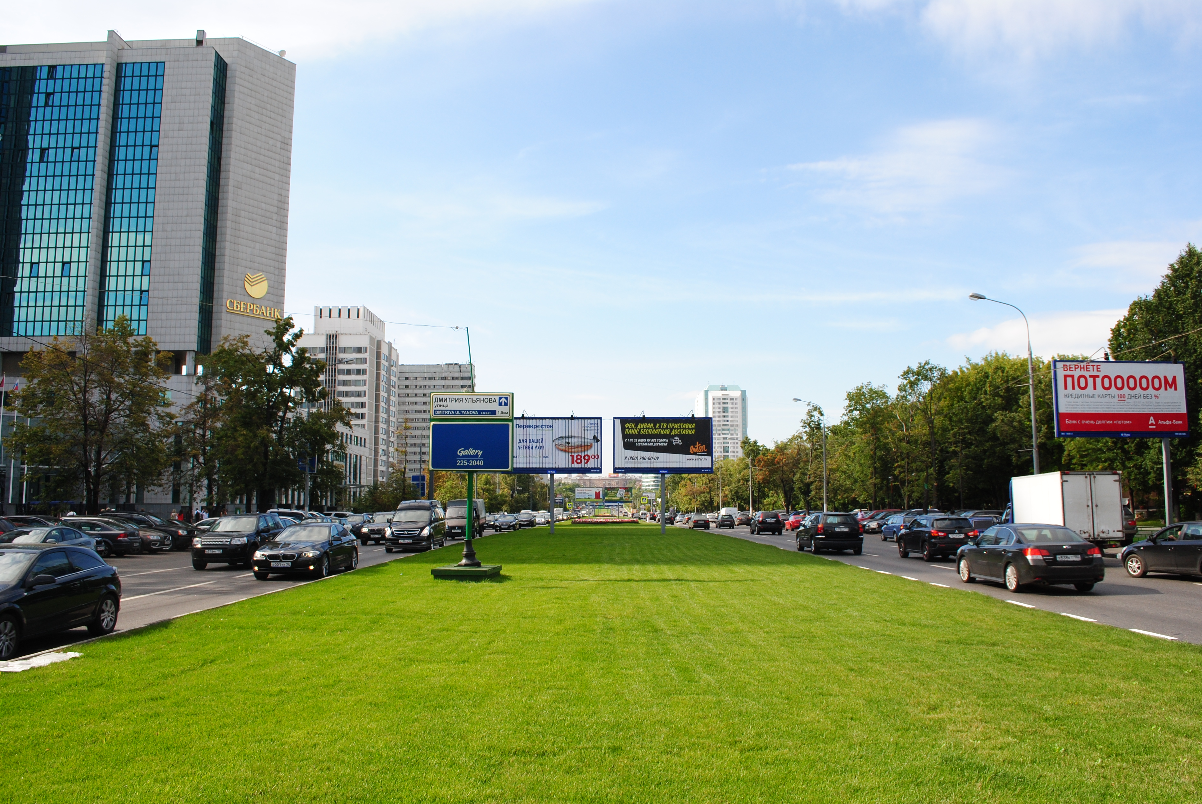 Проспект Шестидесятилетия Октября (вид от улицы Вавилова в сторону Профсоюзной улицы)